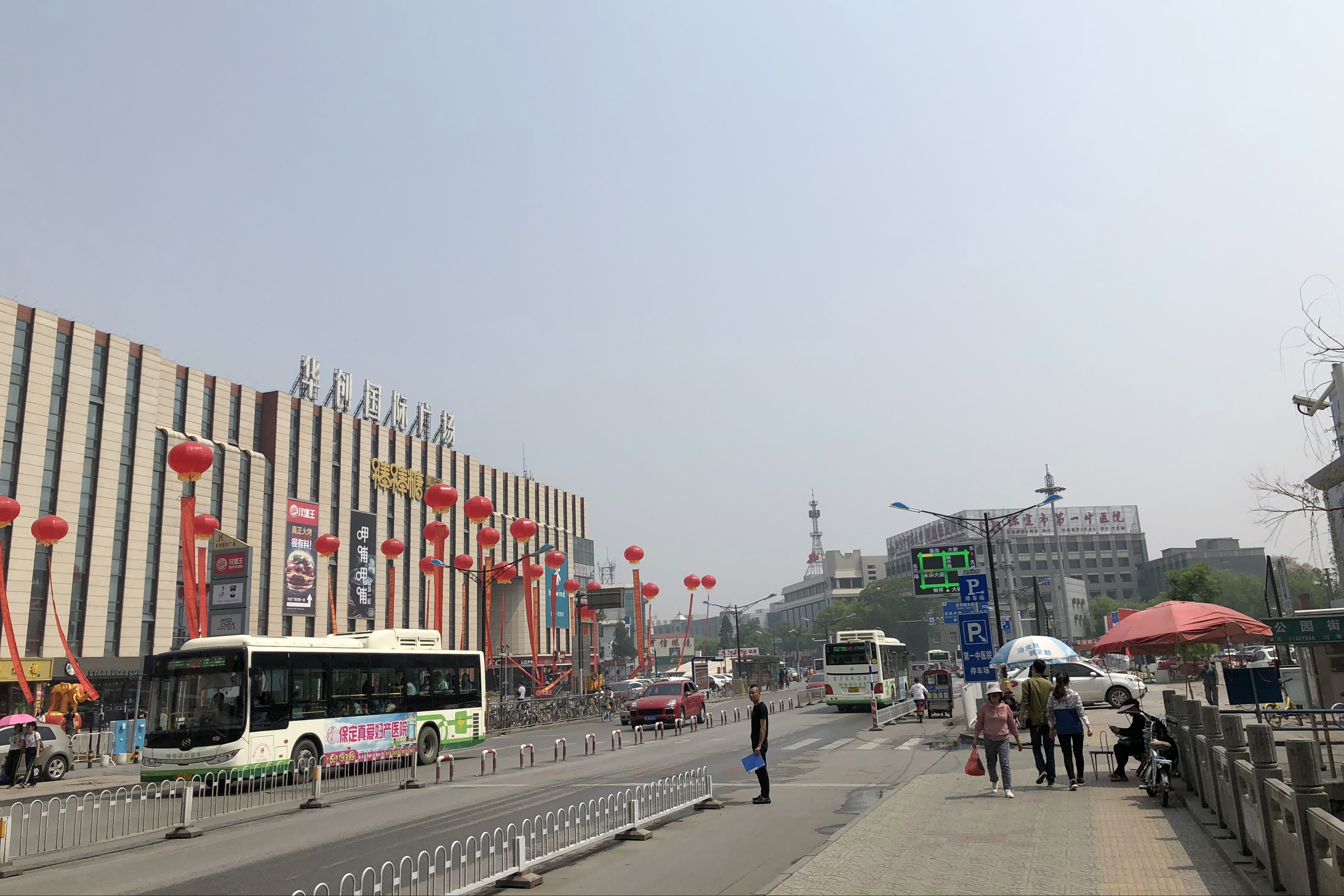 裕华西路街景，站在护城河上的新华桥上拍摄